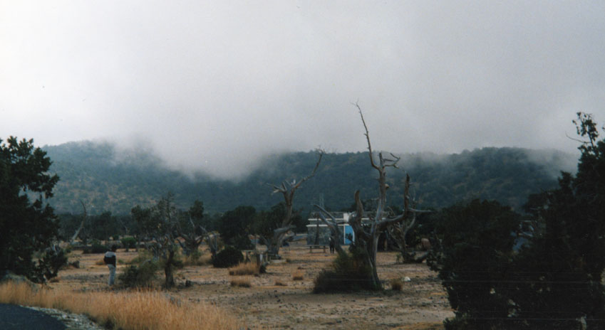 കോടമഞ്ഞിൽ കുളിച്ച് നിൽക്കുന്ന സൂദ മലമുകളിലെ ഒരു സമതലം. ഗൾഫ് മേഖലയിലെ തന്നെ ഏറ്റവും ഉയരം കൂടിയ പ്രദേശമാണ്‌ സൗദിയിലെ അബഹ പ്രവിശ്യയിലെ ഈ വിനോദസഞ്ചാര കേന്ദ്രം